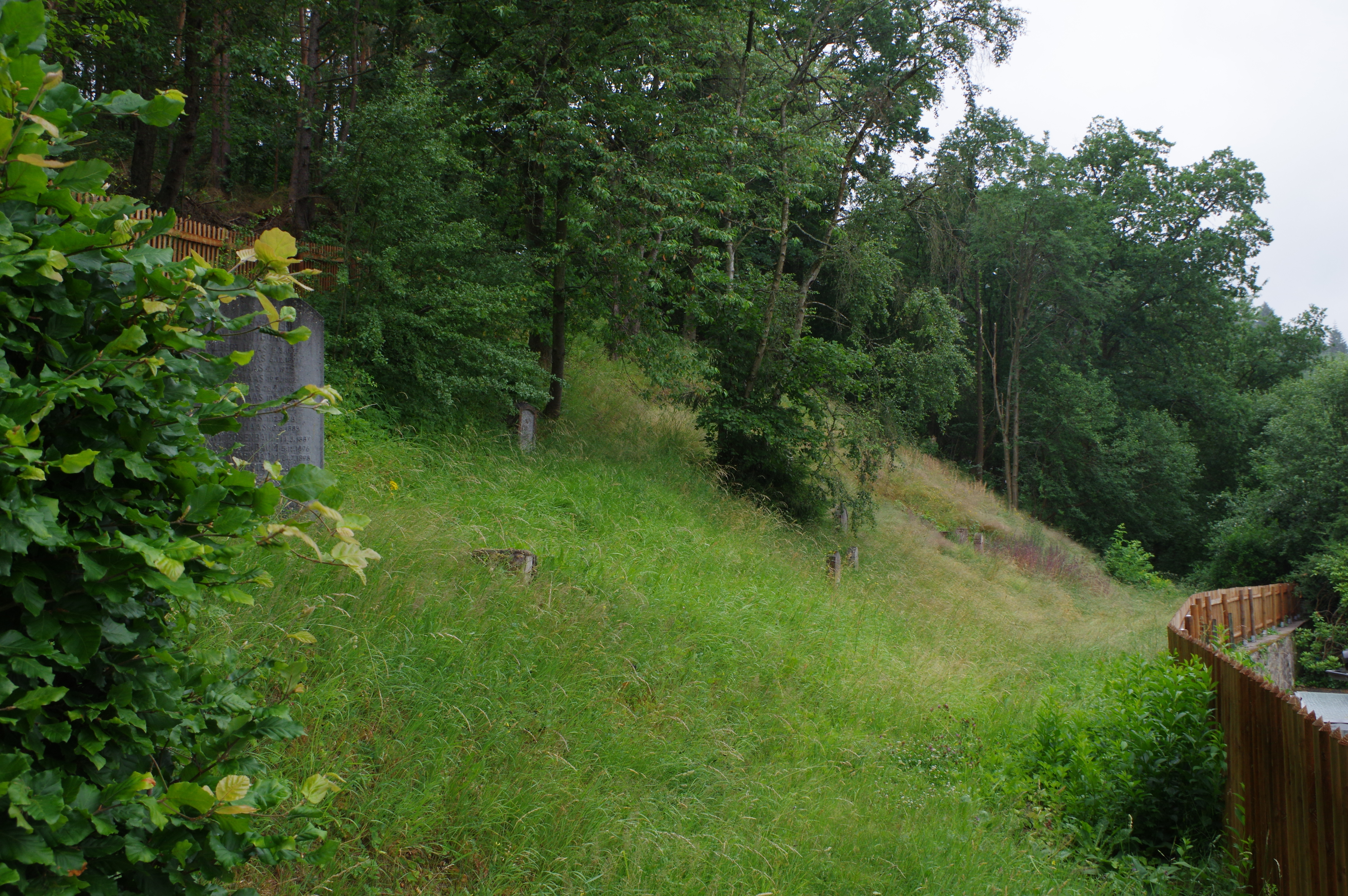 Schleiden, Jüdischer Friedhof, Blick vom Eingang in Richtung Süden